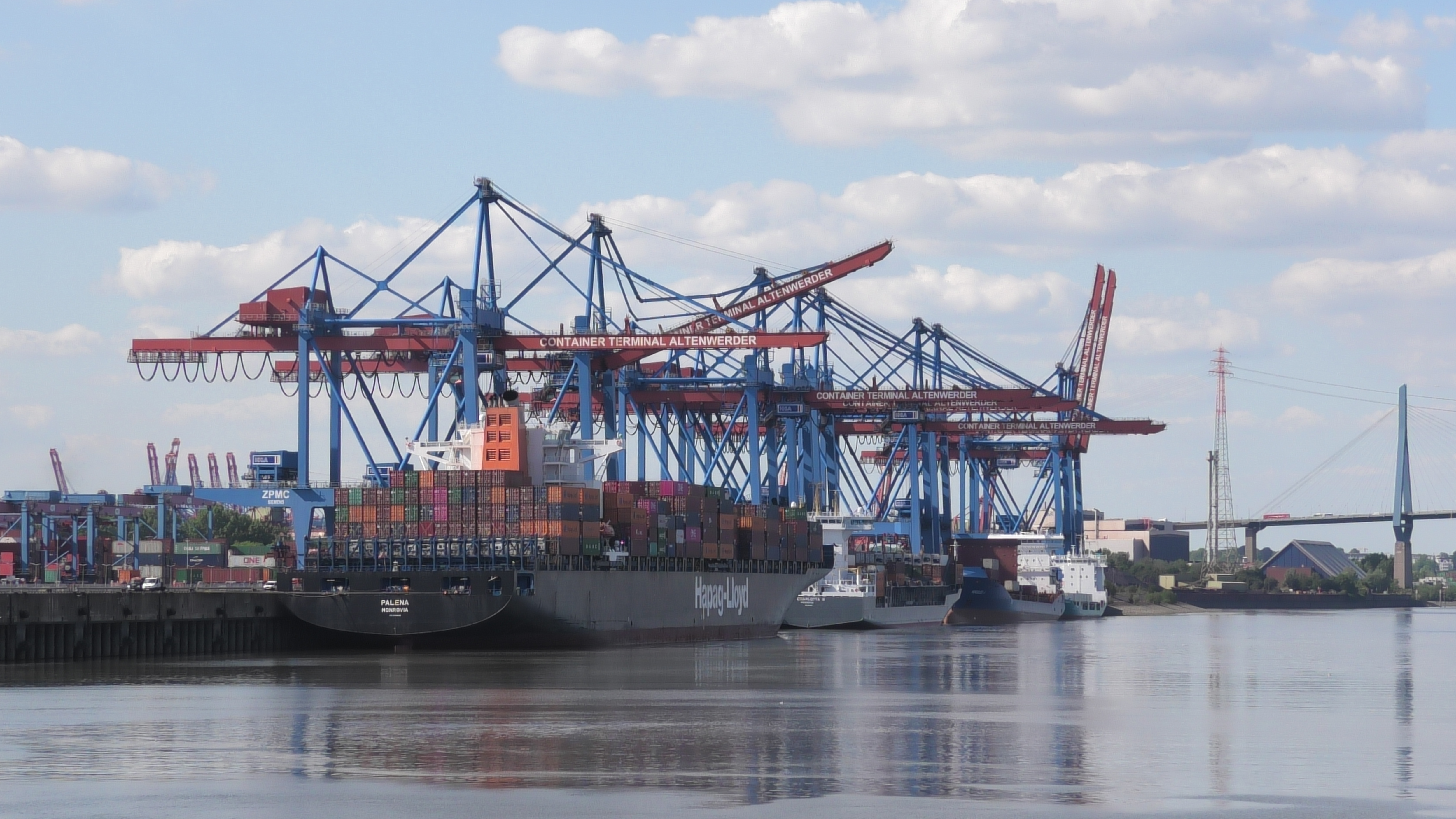 Container Terminal in Hamburg